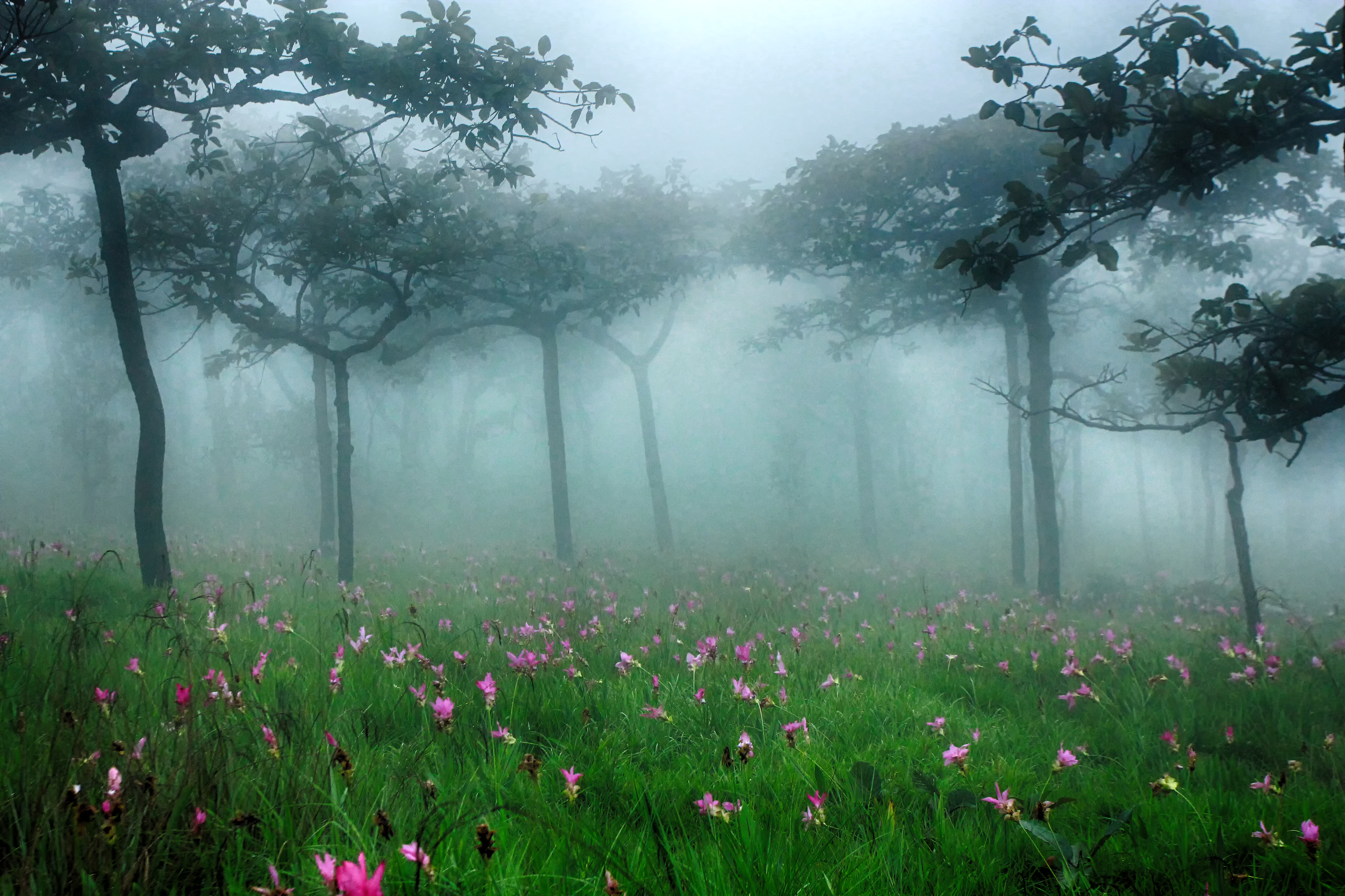 อุทยานแห่งชาติป่าหินงาม ตั้งอยู่ในท้องที่ของอำเภอเทพสถิต จังหวัดชัยภูมิ เป็นอุทยานแห่งชาติลำดับที่ 105 ของประเทศไทย ได้รับการจัดตั้งเป็นอุทยานแห่งชาติเมื่อวันที่ 6 มิถุนายน 2550 ในปี 2528 ได้มีการสำรวจพื้นที่บริเวณป่าหินงาม พบว่ามีความสวยงาม เหมาะจะเปิดเป็นอุทยานเพื่อการพักผ่อนหย่อนใจของประชาชนทั่วไป ทางการจึงเสนอเรื่องไปยังกรมป่าไม้ผ่านทางจังหวัดชัยภูมิ ได้จัดตั้งเป็น วนอุทยานป่าหินงาม ในปี 2528 นั้นเอง ต่อมาได้ทำการสำรวจพื้นที่โดยละเอียดยิ่งขื้น และได้ผนวกเอาพื้นที่ผืนป่าตามแนวสันเขาพังเหยซึ่งเป็นป่าต้นน้ำของลำคันฉูซึ่งไหลลงแม่น้ำชี นอกจากนี้ พื้นที่บริเวณนี้มีความงามของธรรมชาติอย่างสมบูรณ์ จึงได้จัดตั้งเป็นอุทยานแห่งชาติเมื่อปี 2550 ในชื่ออุทยานแห่งชาติป่าหินงาม อุทยานแห่งชาติป่าหินงาม เป็นที่รู้จักดีในหมู่นักท่องเที่ยวว่าเป็นทุ่งดอกกระเจียวที่ใหญ่และสวยงามมากแห่งหนึ่ง โดยทุ่งดอกกระเจียวอีกแห่งหนึ่งที่ได้รับความนิยมไม่แพ้กันคือที่อุทยานแห่งชาติไทรทอง นอกจากนี้ ยังมีลานหินงาม ซึ่งมีหินรูปร่างแปลกตามากมาย เกิดจากการกัดเซาะของหินทรายเป็นเวลานับพันปี